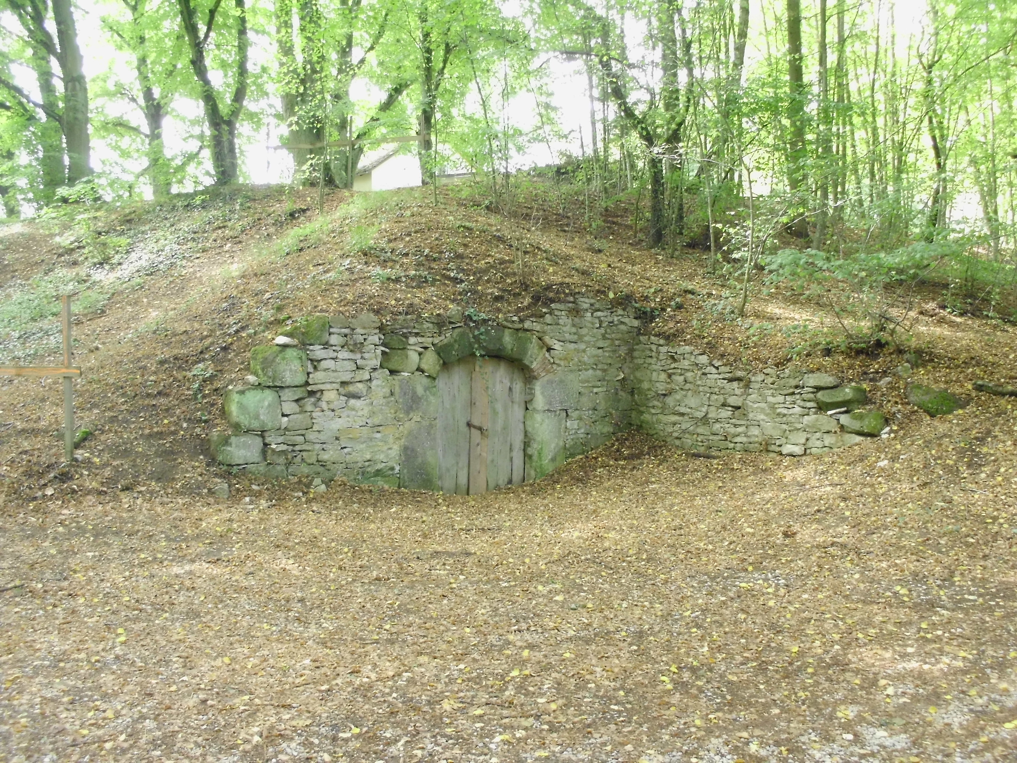 Bierkeller im Plateau der ehemaligen Burg Landeck bei Thalmässing (Landkreis Roth)